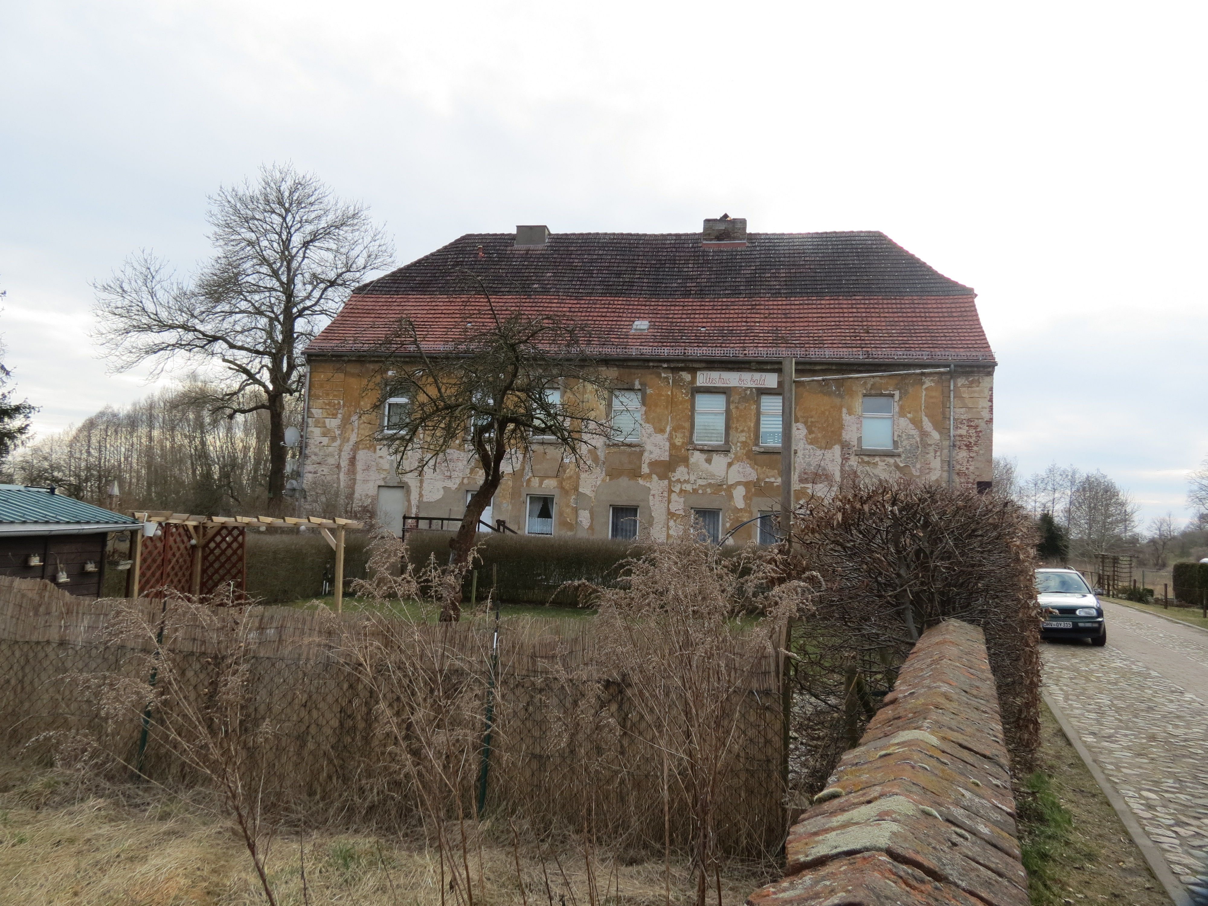 Altes Amtshaus in Vehlefanz, Gemeinde Oberkrämer, Lkr. Oberhavel, Brandenburg